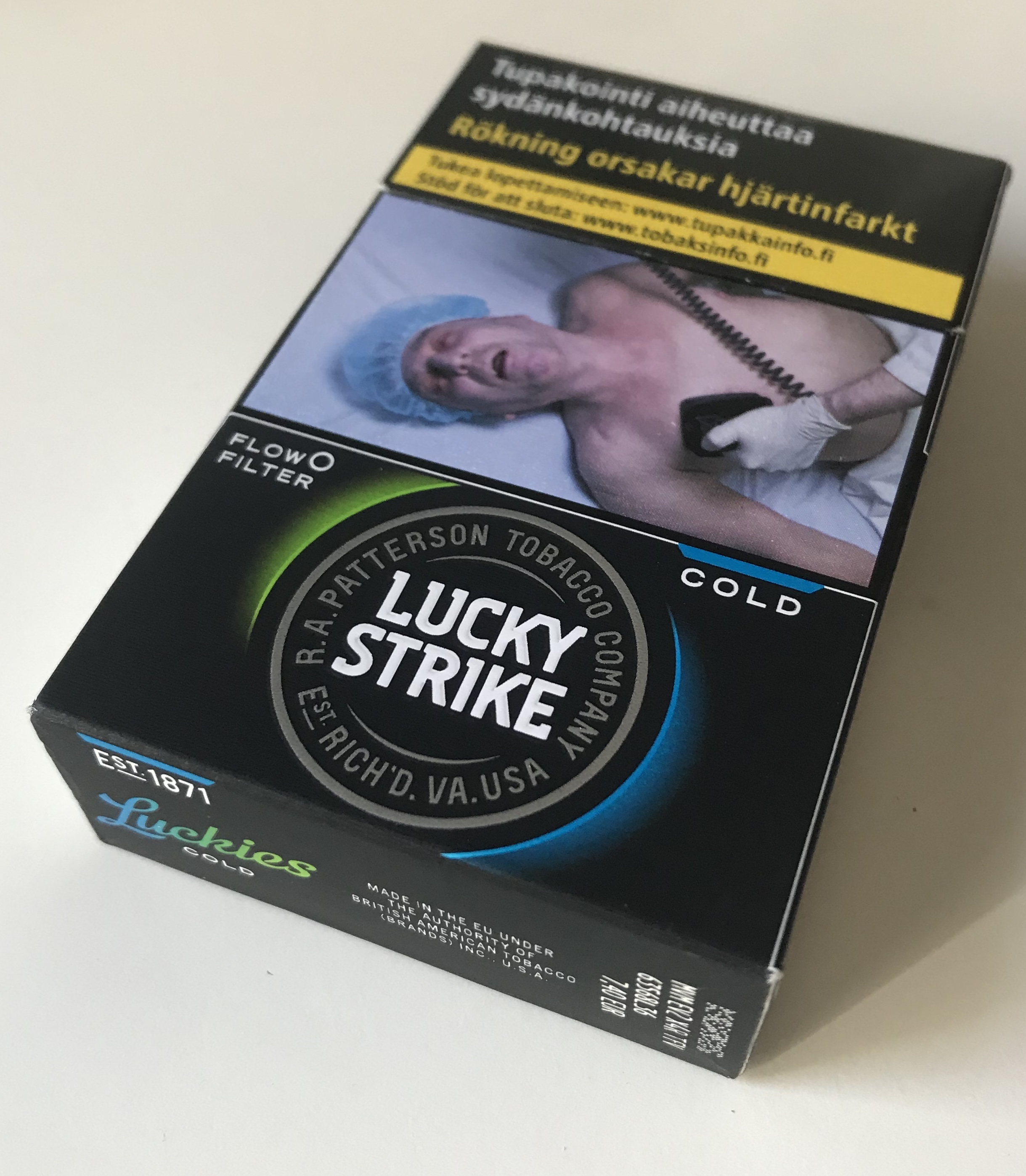 Lucky Strike Cold with European standardized warning labels